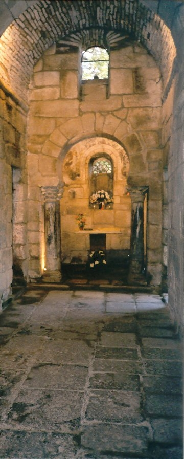 Interior da igrexa de Santa Comba de Bande Licensing Categoría:Imaxes de Bande